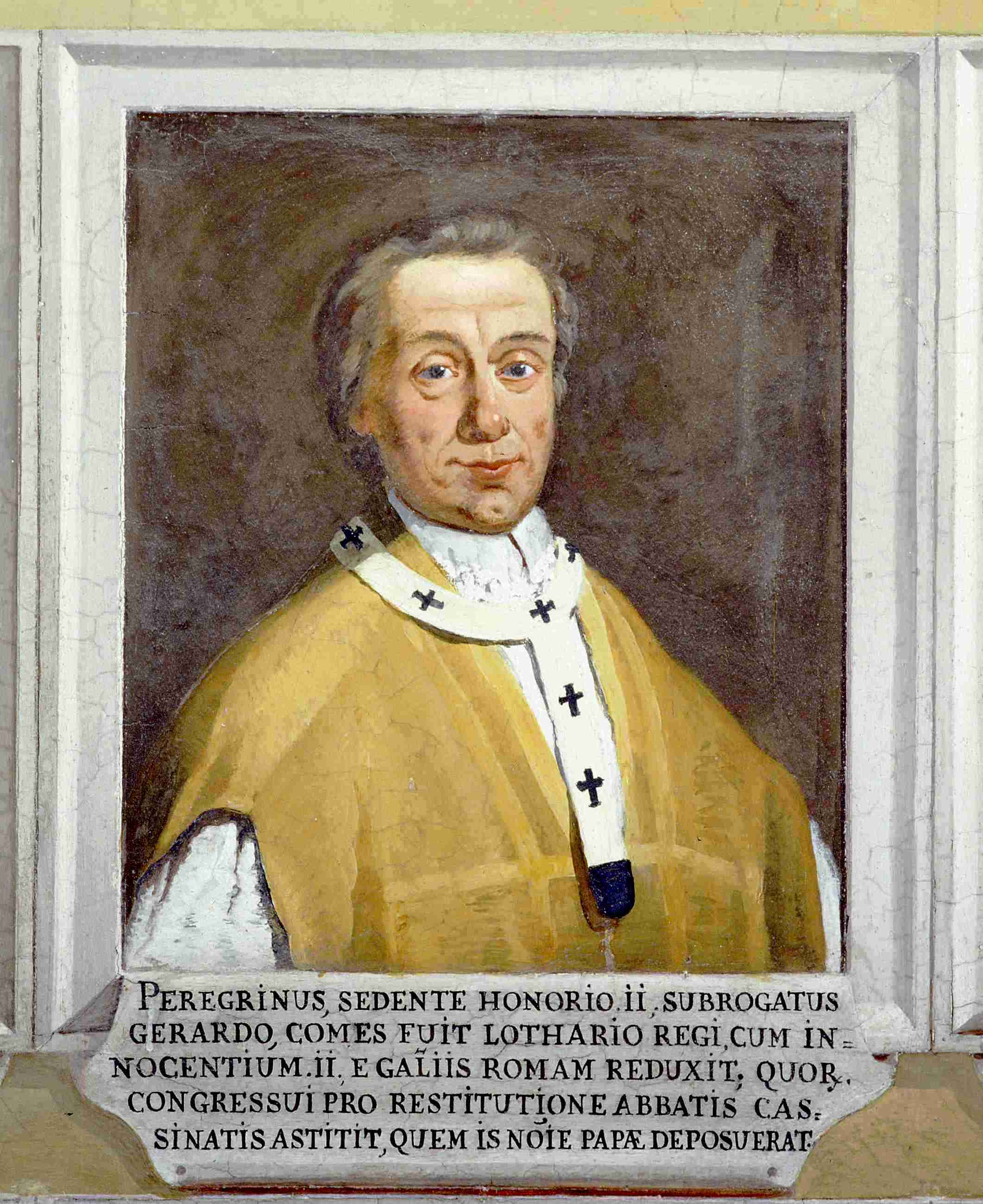 Pellegrino di Povo di Beseno di Manzano